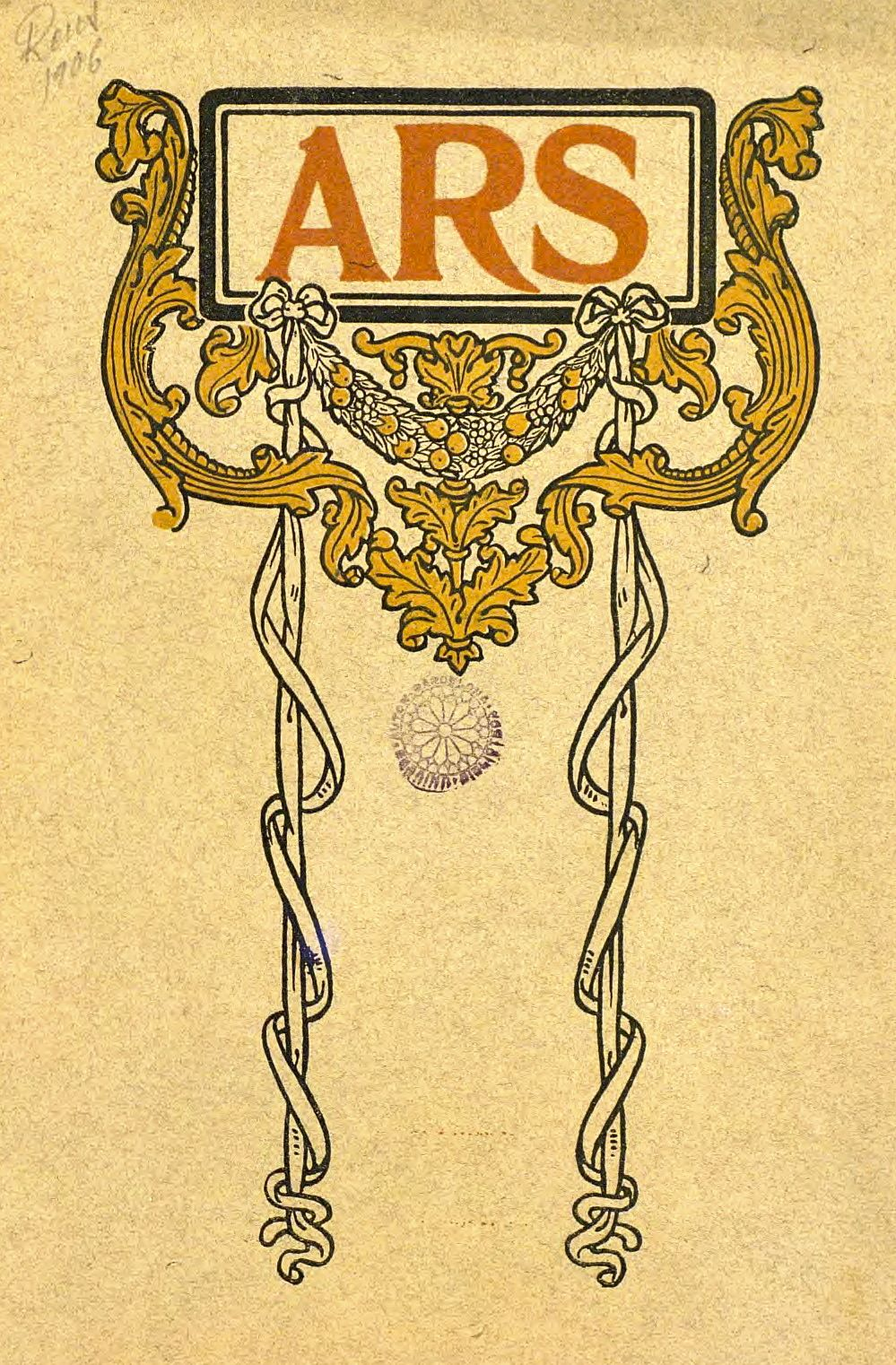 Coberta d'Ars: revista del Centro de Lectura